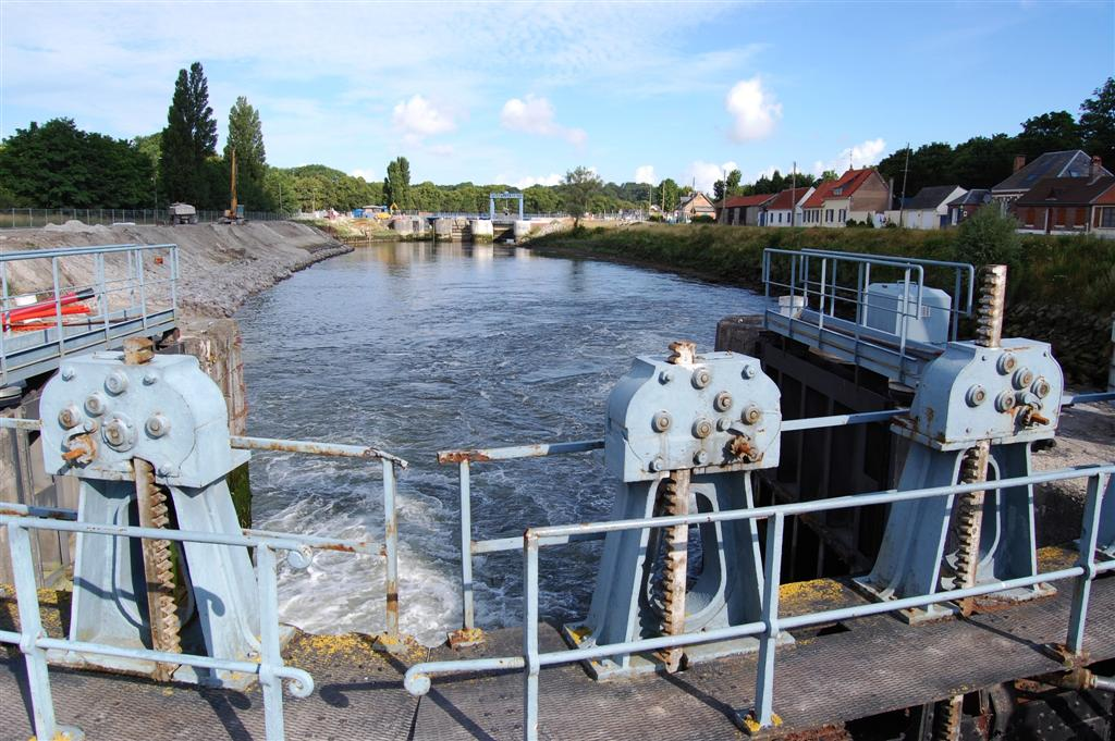 De zeesluis te Valery-sur-Somme in het Canal-de-la-Somme